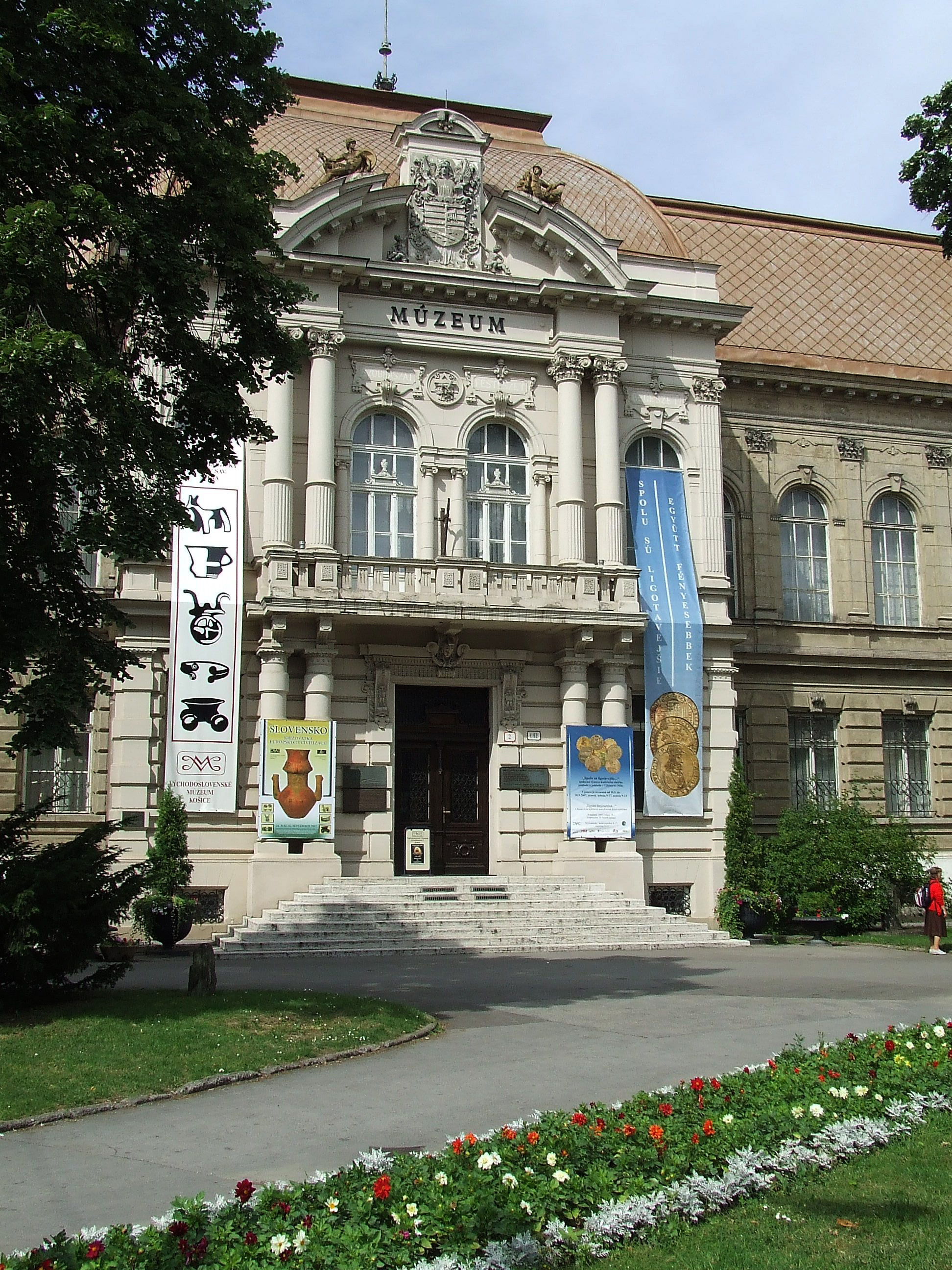 Budova východoslovenského múzea v Košiciach